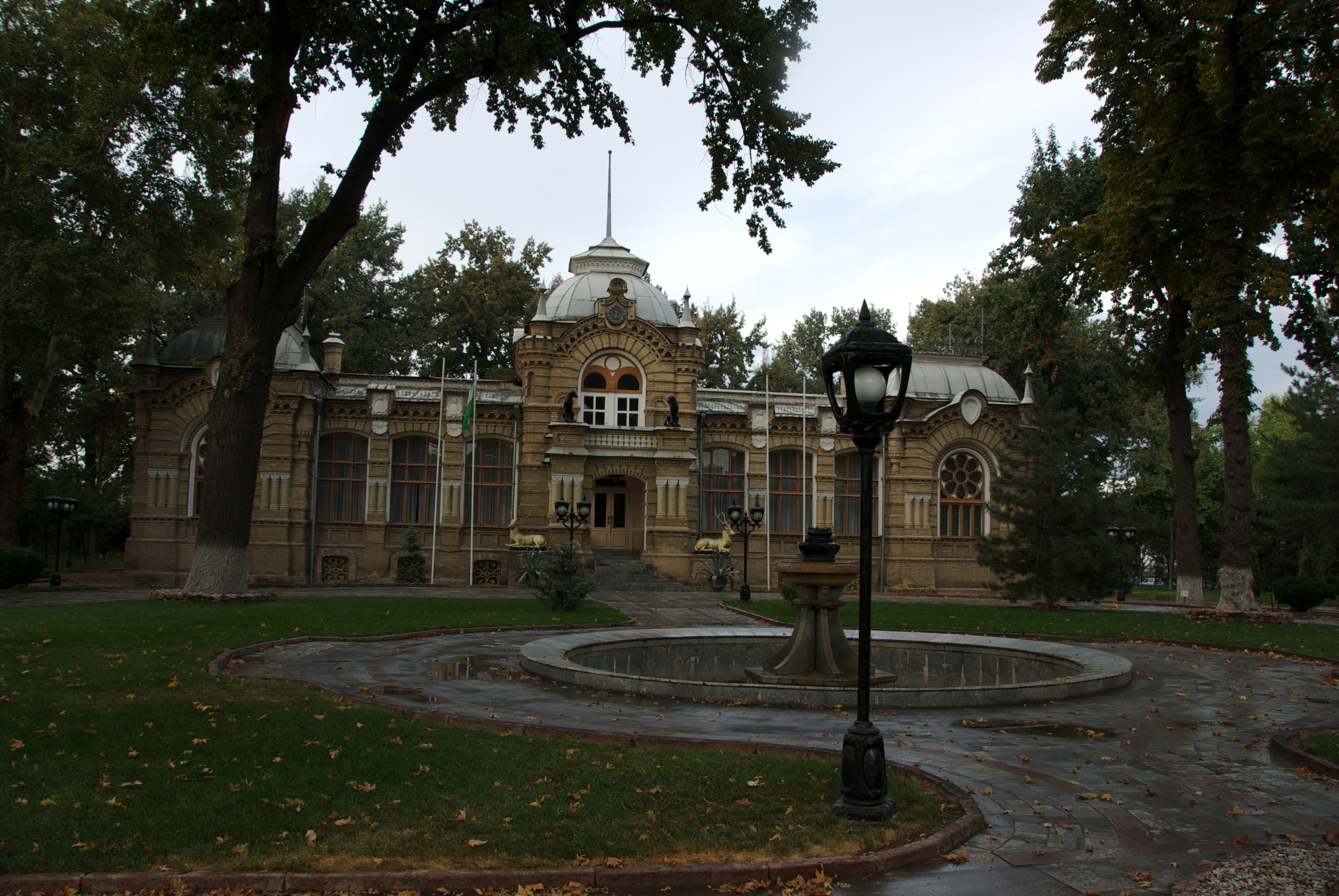 stans08-278